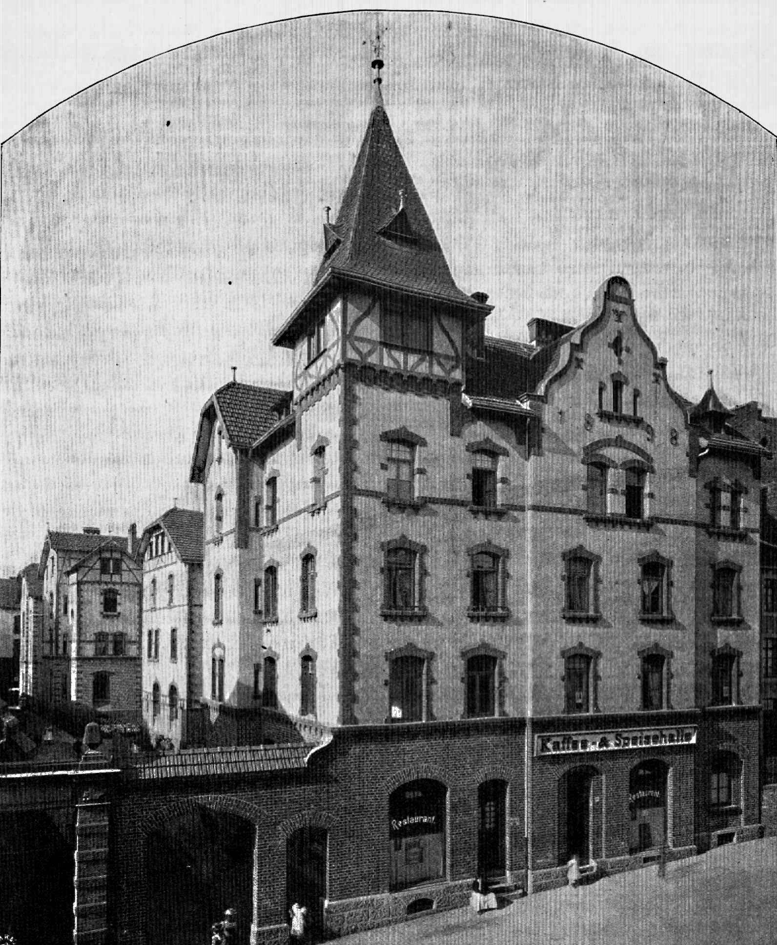 Arbeiterkolonie Sandkaulstrasse 105 der Gewoge AG (Architekt H. Voigt), 1894 - 1898 erbaut